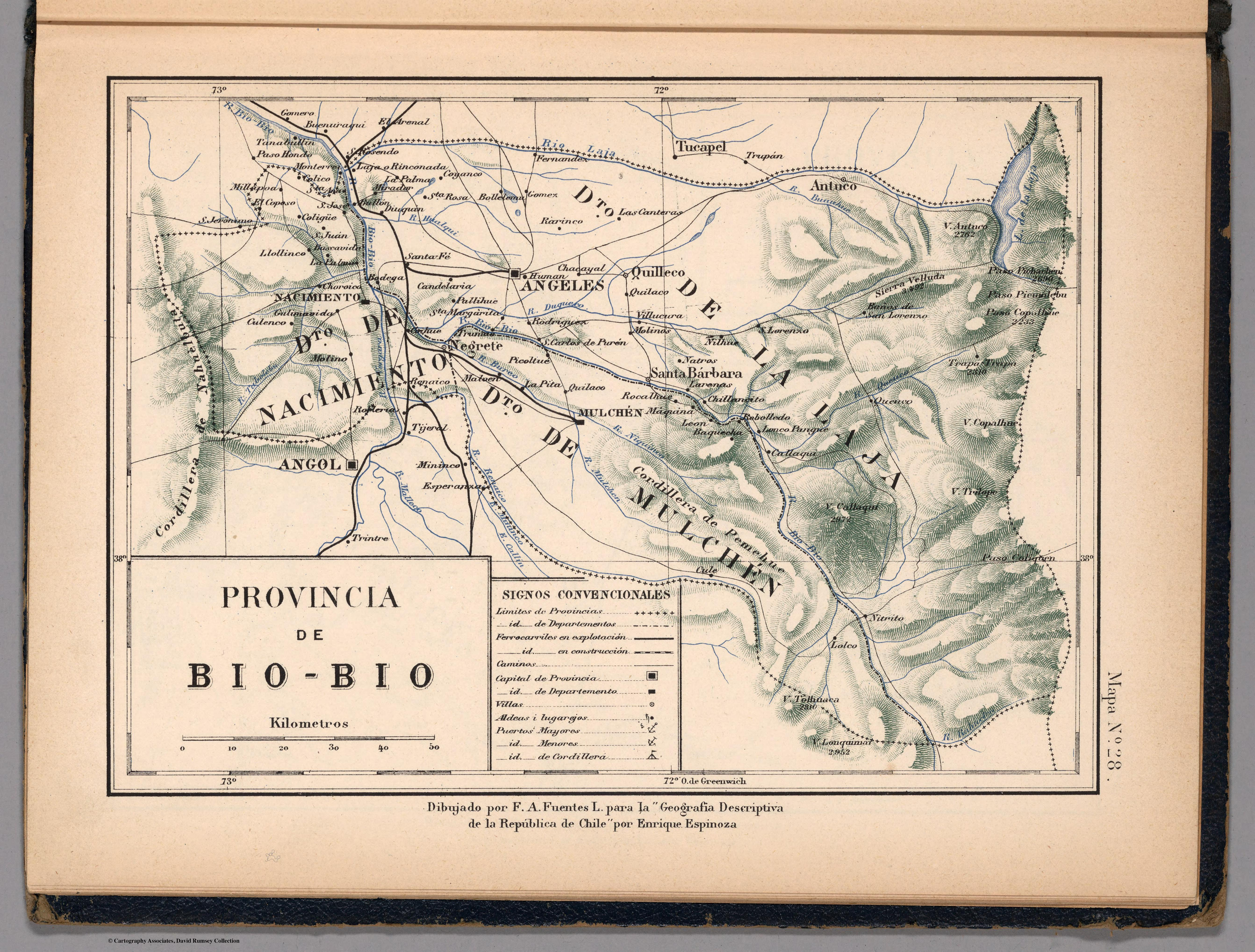 Atlas de Chile Arreglado para la Jeografia Descriptiva de la Republica de Chile por Enrique Espinoza.